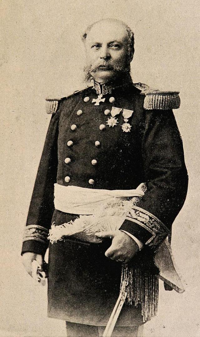 Arístides Martínez Cuadros (*La Serena, 1847 - † 27 de marzo de 1908 Santiago, Chile) Fue un militar y político chileno. Fue hijo de Victoriano Martínez Gutiérrez y Josefa Cuadros Pumarada. Se casó en el año 1881, con María Teresa Cuadros y no tuvo descendencia.